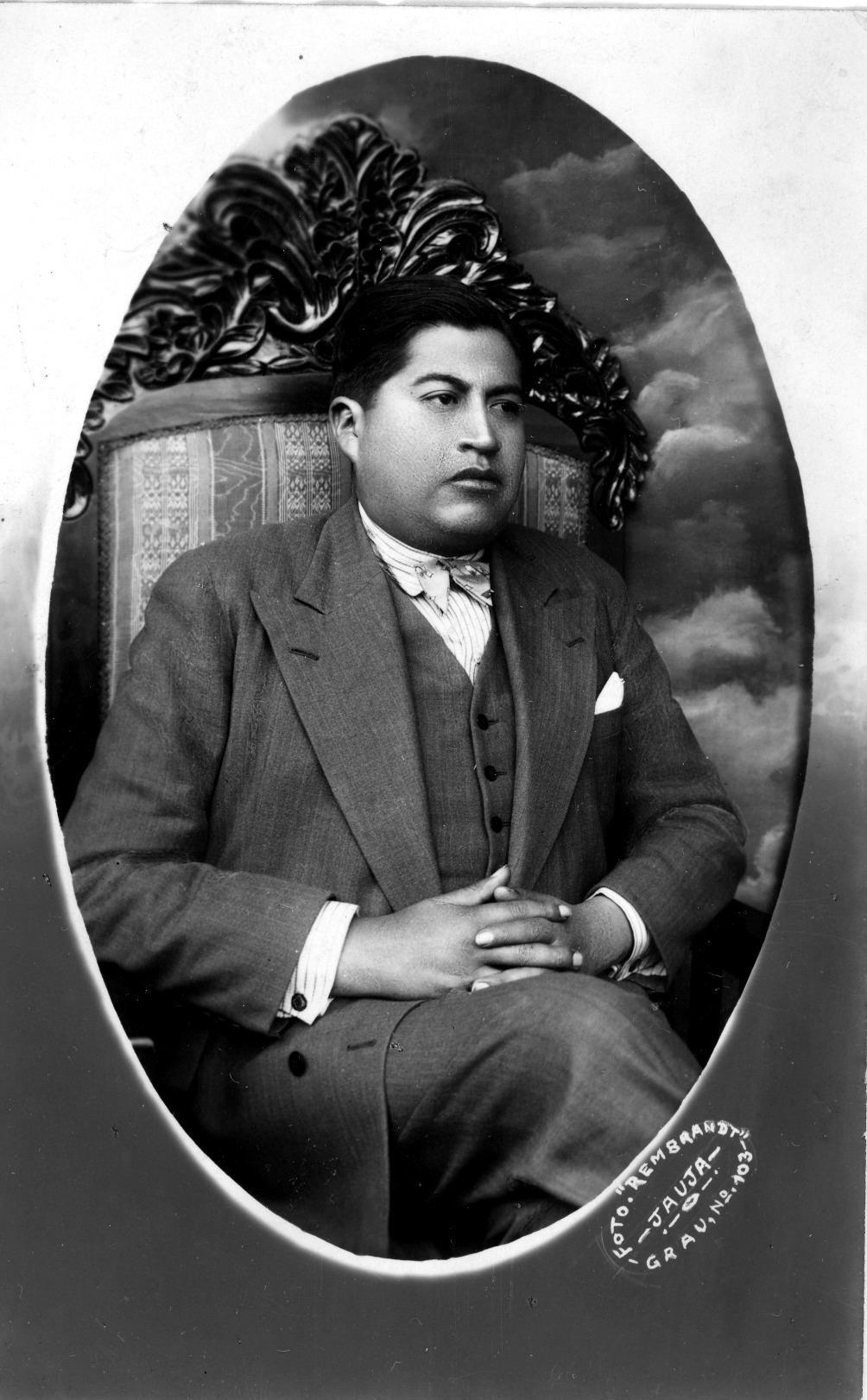 Alcalde de Jauja desde1931 a 1934